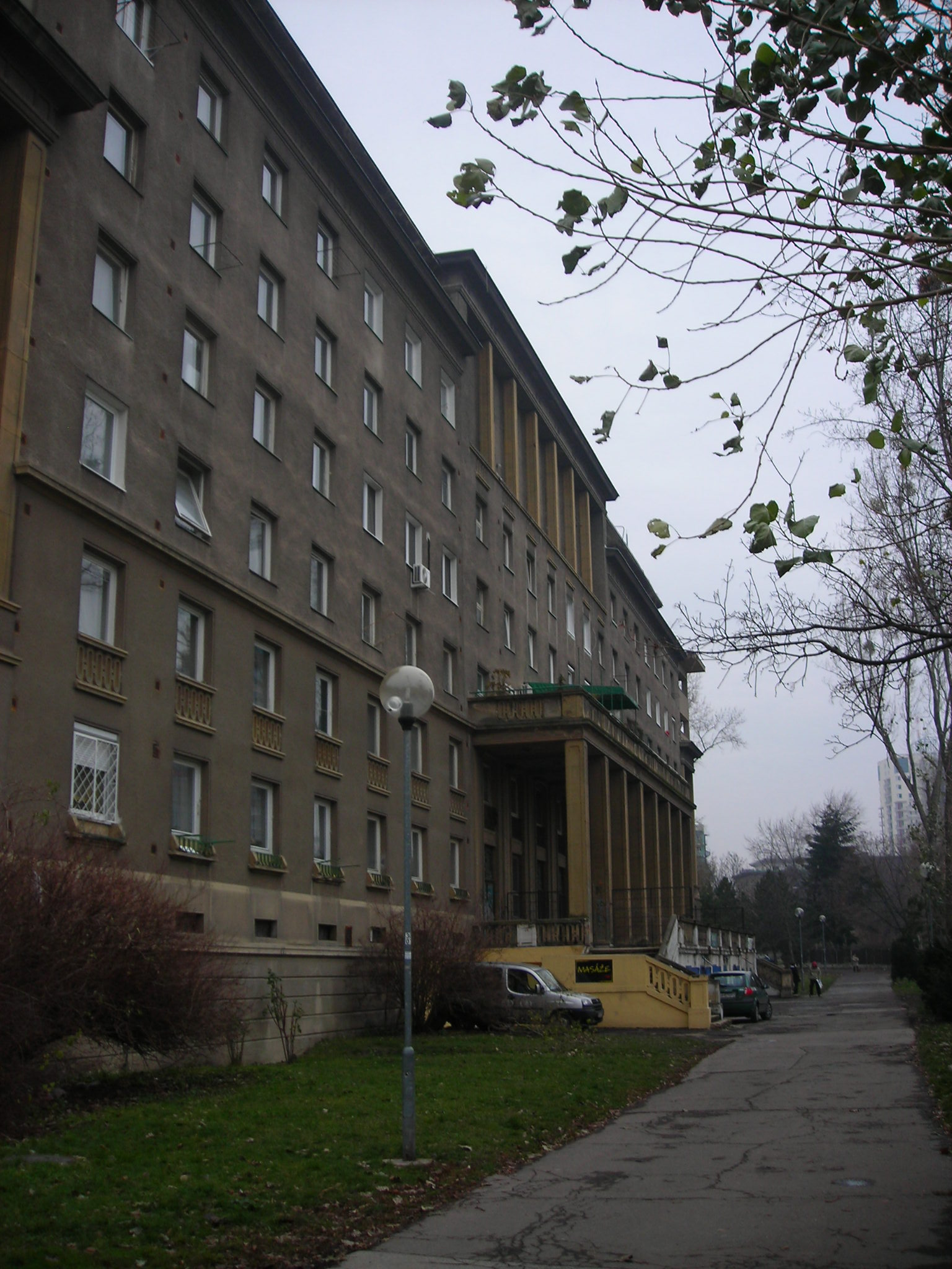 sídlisko je typickým príkladom socialistického realizmu